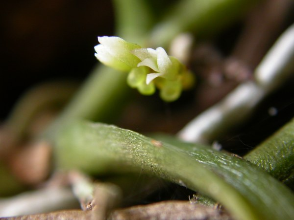 Campylocentrum densiflorum - Minas Gerais